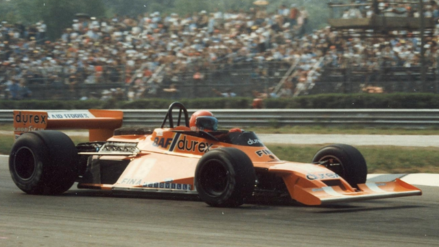 Il pilota automobilistico italiano Gimax, pseudonimo di Carlo Franchi, su Surtees TS20 nelle prove del GP d'Italia 1978. Licensing Surtees TS20 Gimax